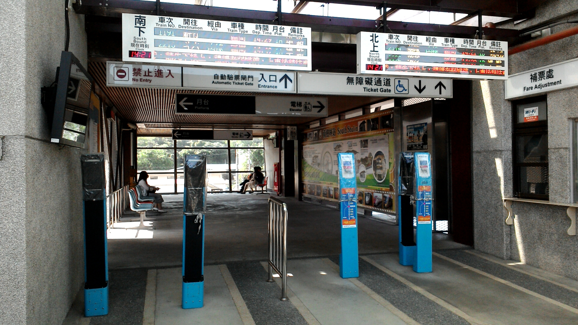 臺灣鐵路管理局南樹林車站驗票閘門正面。